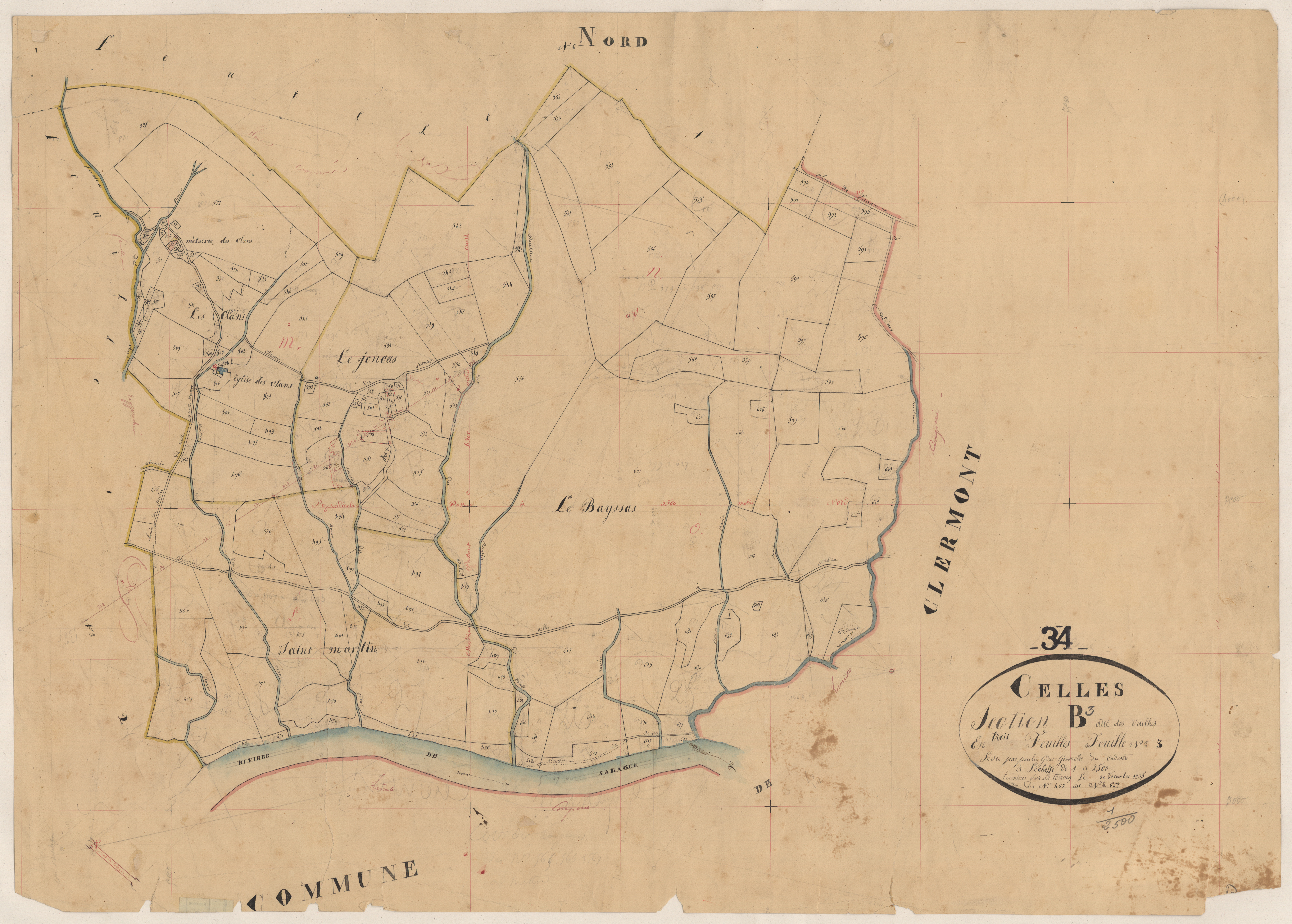 Celles. - Cadastre napoléonien : section B3 des Vailhès.